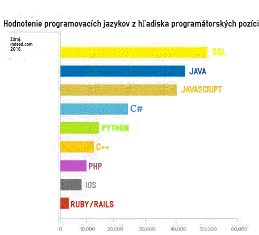 Tento obrázok som zostrojil dnes. Jedná sa o uplatnenie programovaích jazykov v praxi za rok 2016.